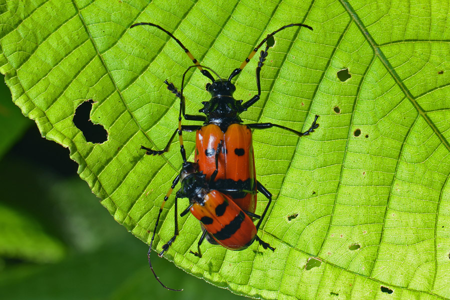 Sternacanthus picticornis Pascoe 1857 det. F. Vitali Los Amigos Conservation Concession, Madre de Dios, Peru